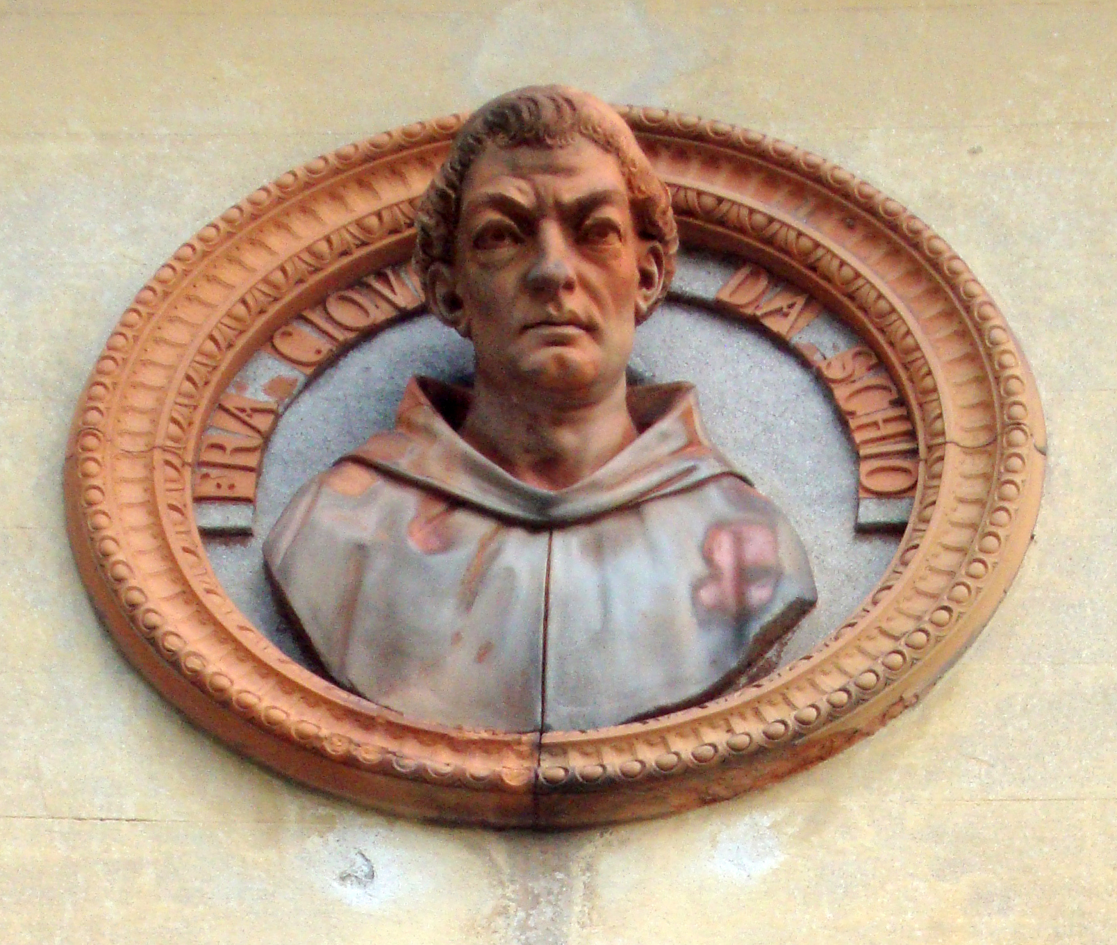 Schio, particolare della facciata del Teatro Jacquard This is a photo of a monument which is part of cultural heritage of Italy.